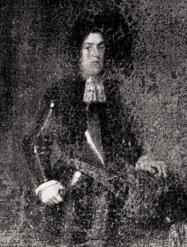 Gustaf Carlsson, seit 1674 schwedischer Graf von Börring (Greve av Börringe), Herr von Lindholm (* 13. März 1649 [1647 ?] in Stockholm; † 11. [1. ?] Januar 1708 im friesischen Schloss ter Horn), war der voreheliche Sohn des Königs Carl X. Gustav von Schweden, Offizier in schwedischen und Generalleutnant in generalstaatlichen Diensten sowie schwedischer und friesischer Großgrundbesitzer.